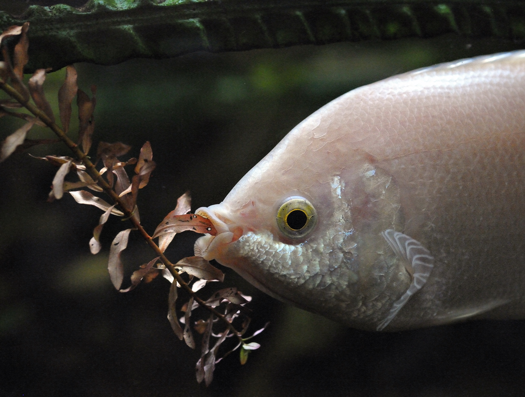 Helostoma temminkii in an aquarium.